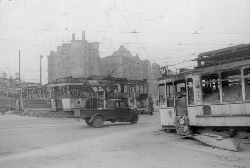 Berlin, Panzersperre ADN-ZB/Archiv Das faschistische Deutschland im II. Weltkrieg 1939-45 Berlin wird am 1. Februar 1945 zum "Verteidigungsbereich" erklärt. Es werden Barrikaden errichtet, Stellungen und Panzergräben ausgehoben. Ausgebrannte Straßenbahnwagen dienten zum Bau dieser Straßensperre im März 1945. Aufnahme: Ruge